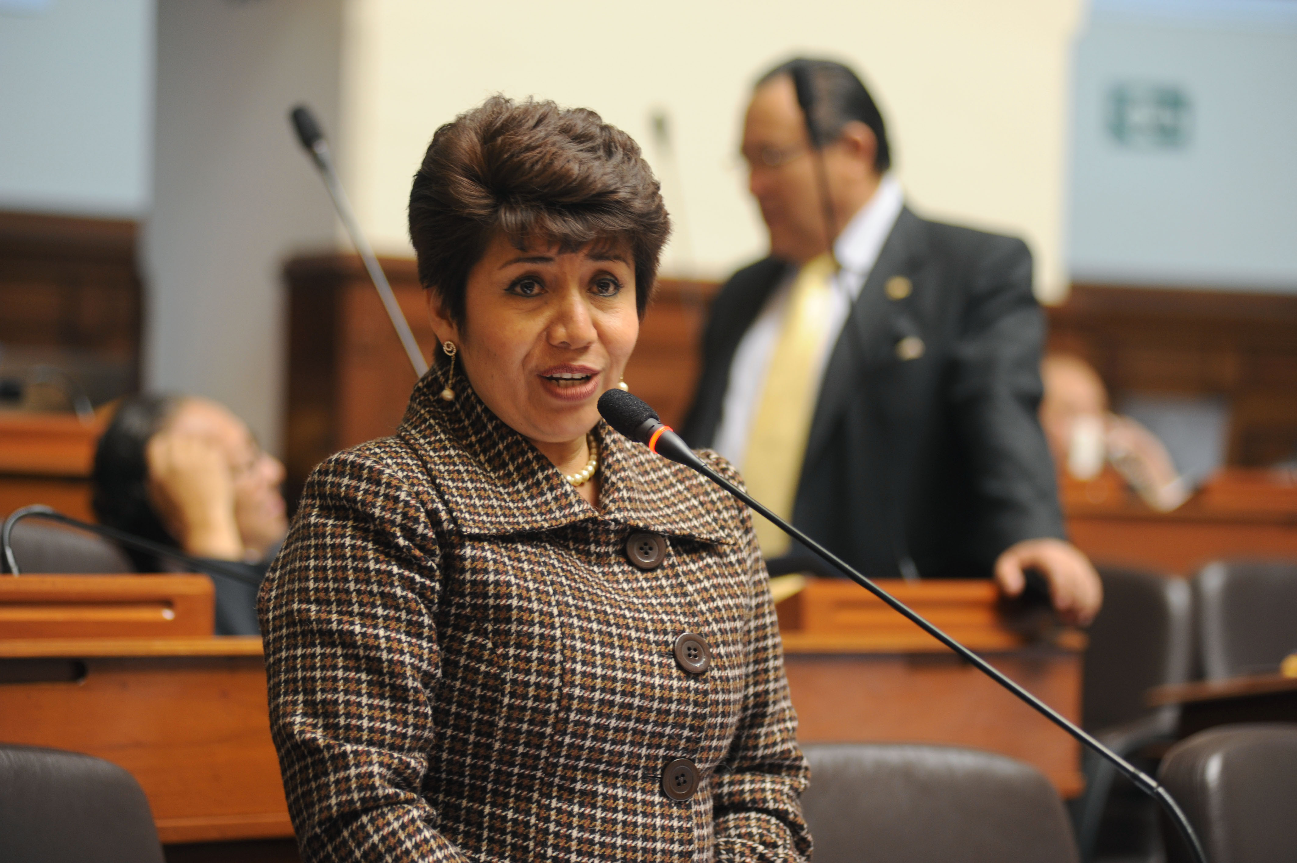 La legisladora Helvezia Balta fija su posición en el debate parlamentario realizado esta tarde por el Pleno.